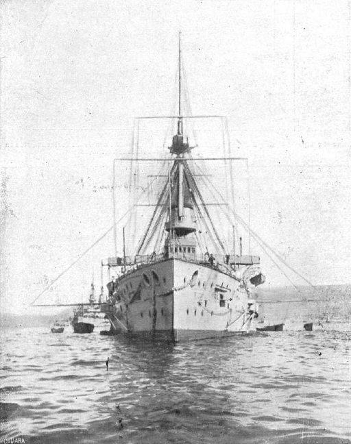 Fotografía del acorazado británico Duncan publicada en 1914 con motivo de la entrada del Reino Unido en la Gran Guerra